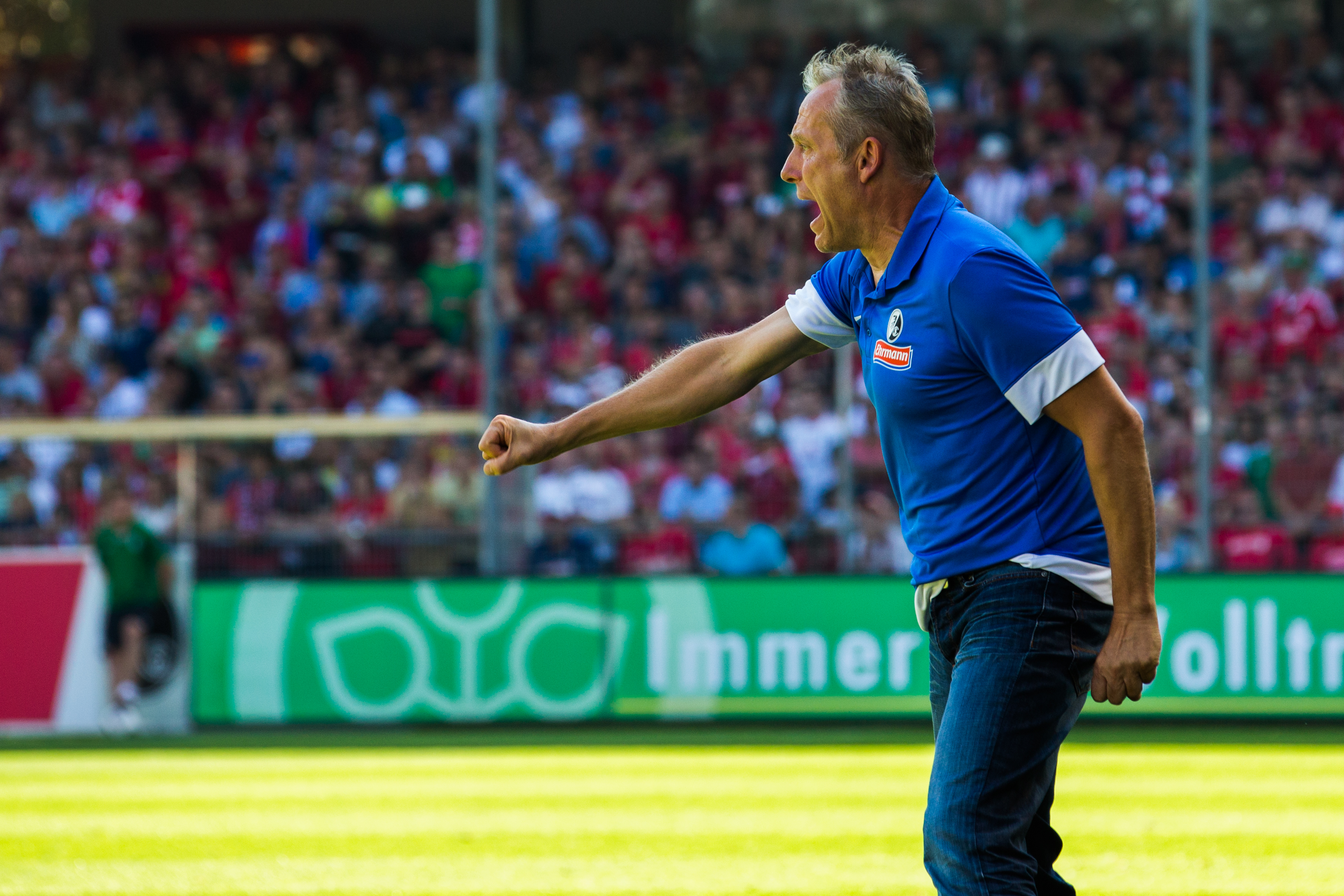 SC Freiburg vs FSVMainz 17 août 2013